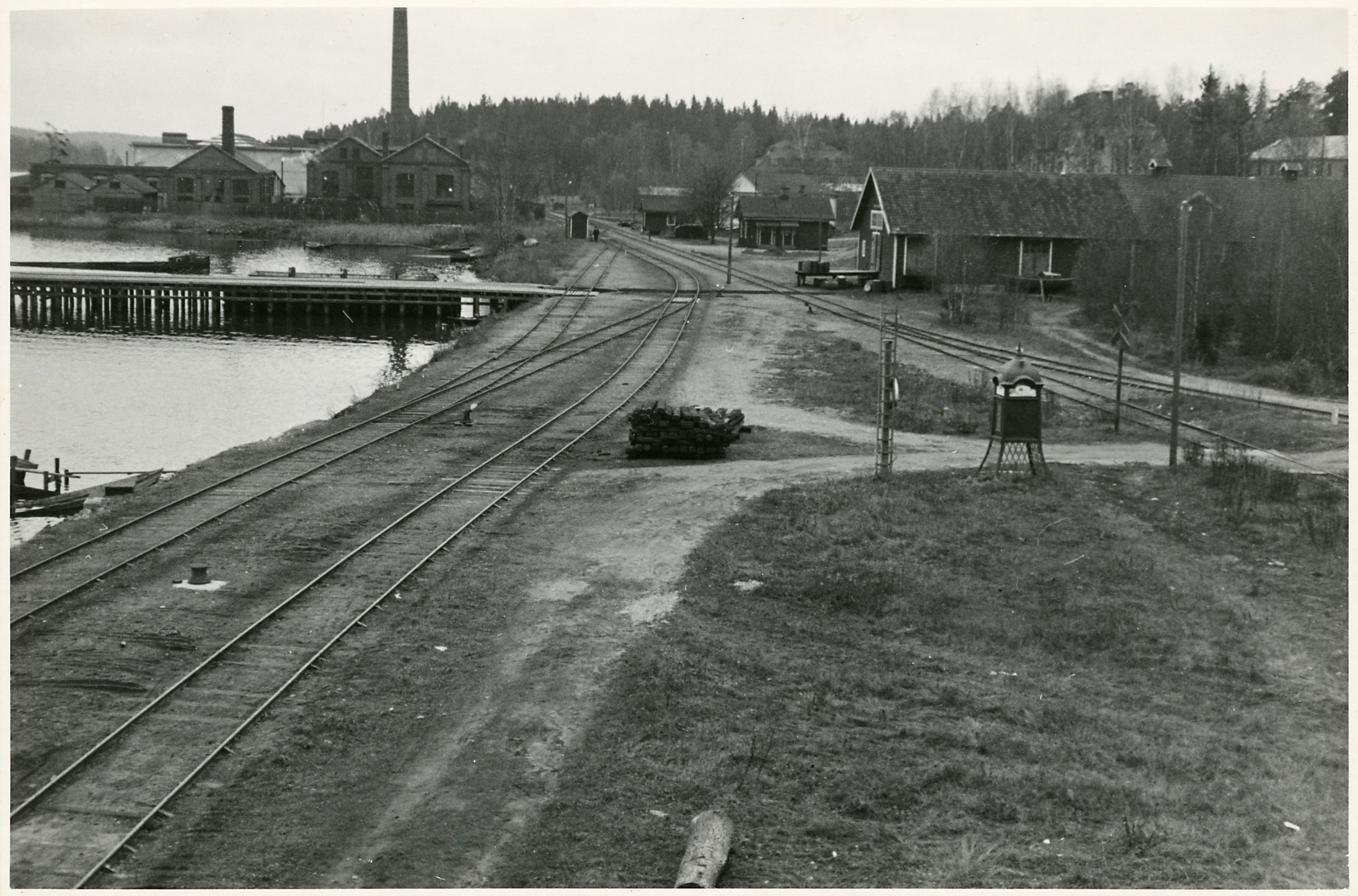 Södertälje uthamn. Text på omslag: "Bilderna tagna inför elektrifieringen av bandelar i Sverige". Text på omslag: "Södertälje Uthamn". Historik Fotografering 1930 - 1939 FOTOGRAF Fotograf okänd